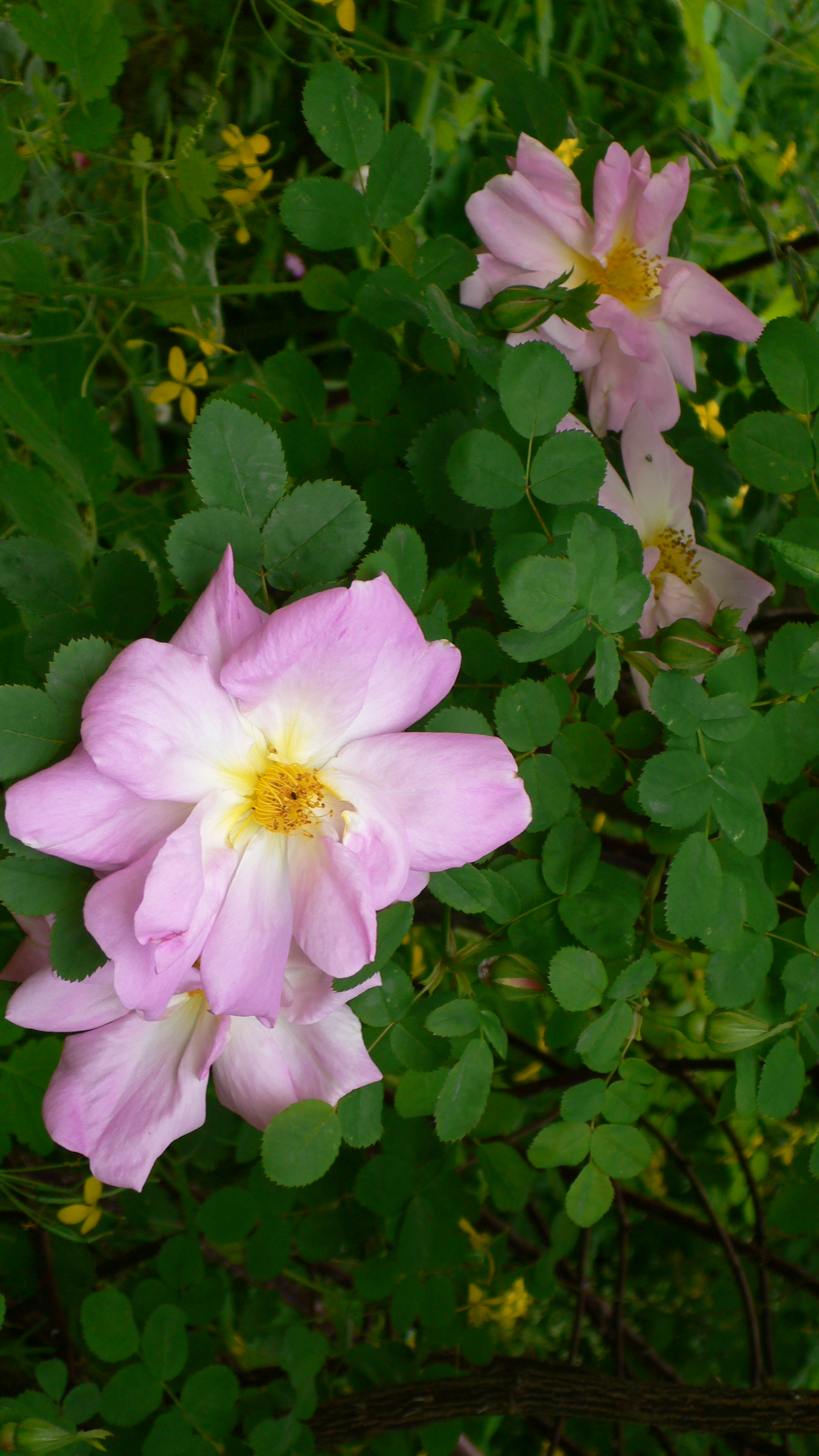 Rosa 'Marguerite Hilling', jardin du Rosaire Lyon, détail de la fleur